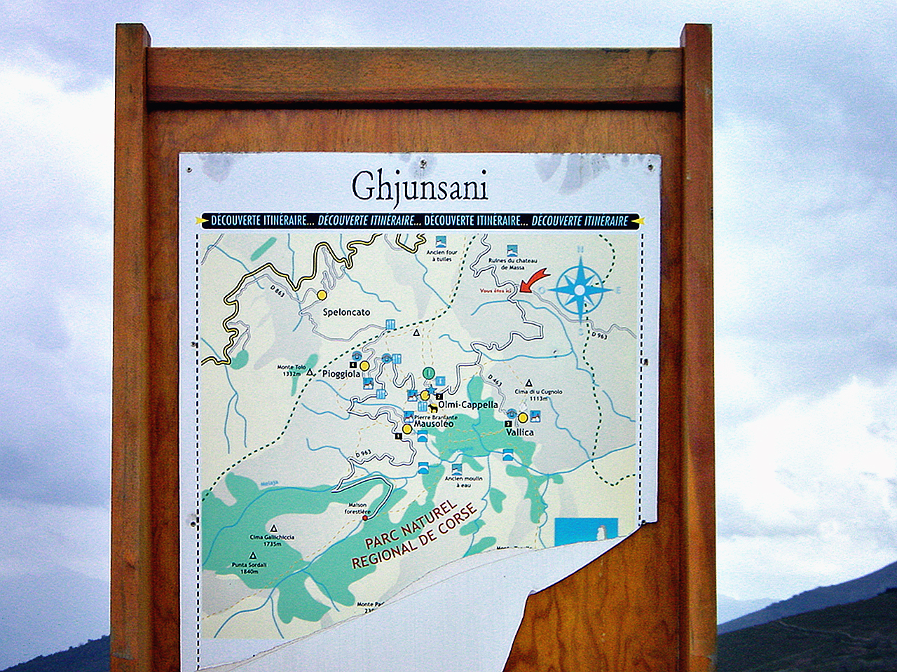 Olmi-Cappella (Corsica) - Carte du Giunsani